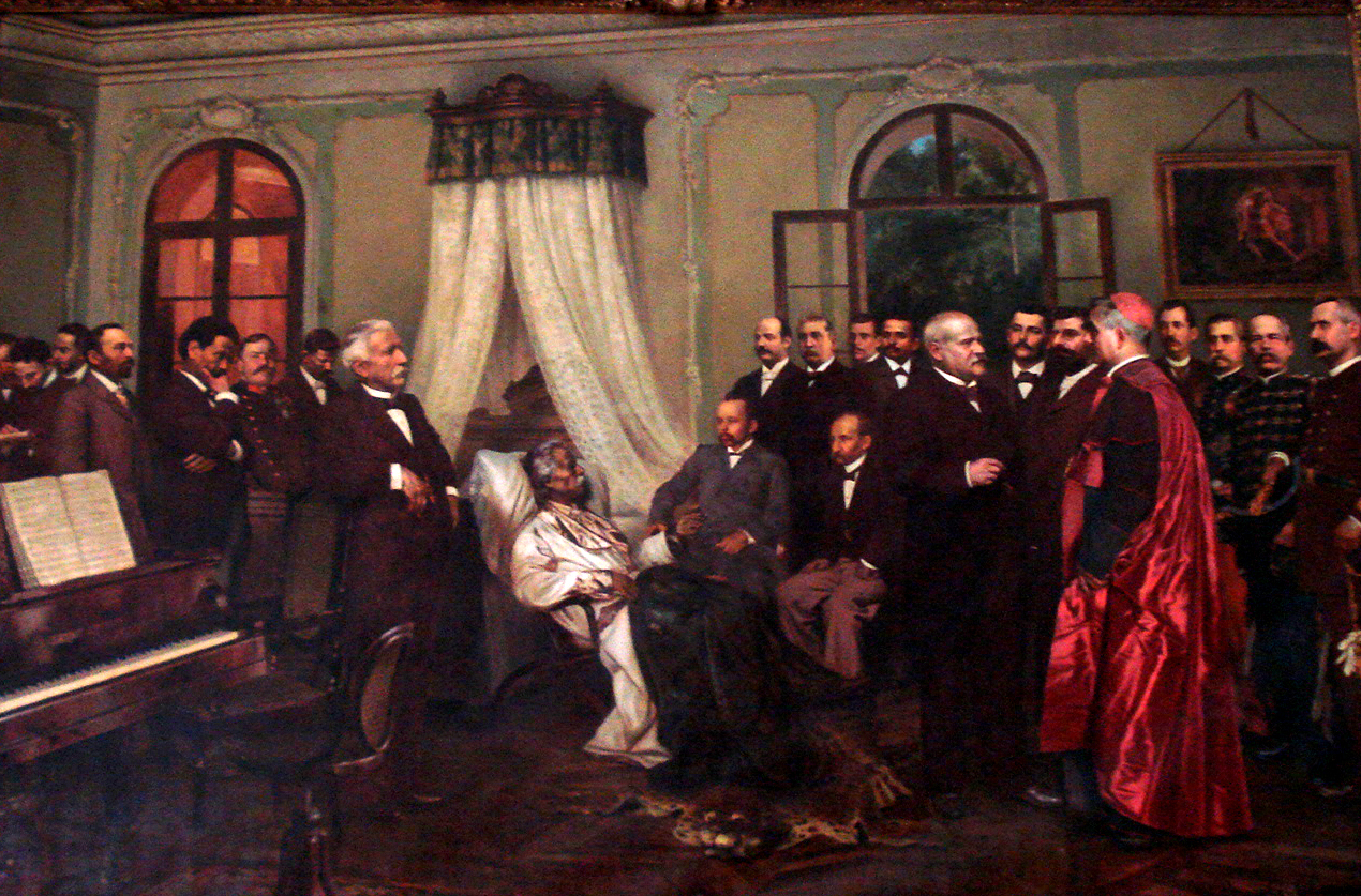 Últimos dias de Carlos Gomes (1899), pintura de Domenico De Angelis e Giovanni Capranesi. Acervo do Museu de Arte de Belém, Belém, Pará, Brasil.